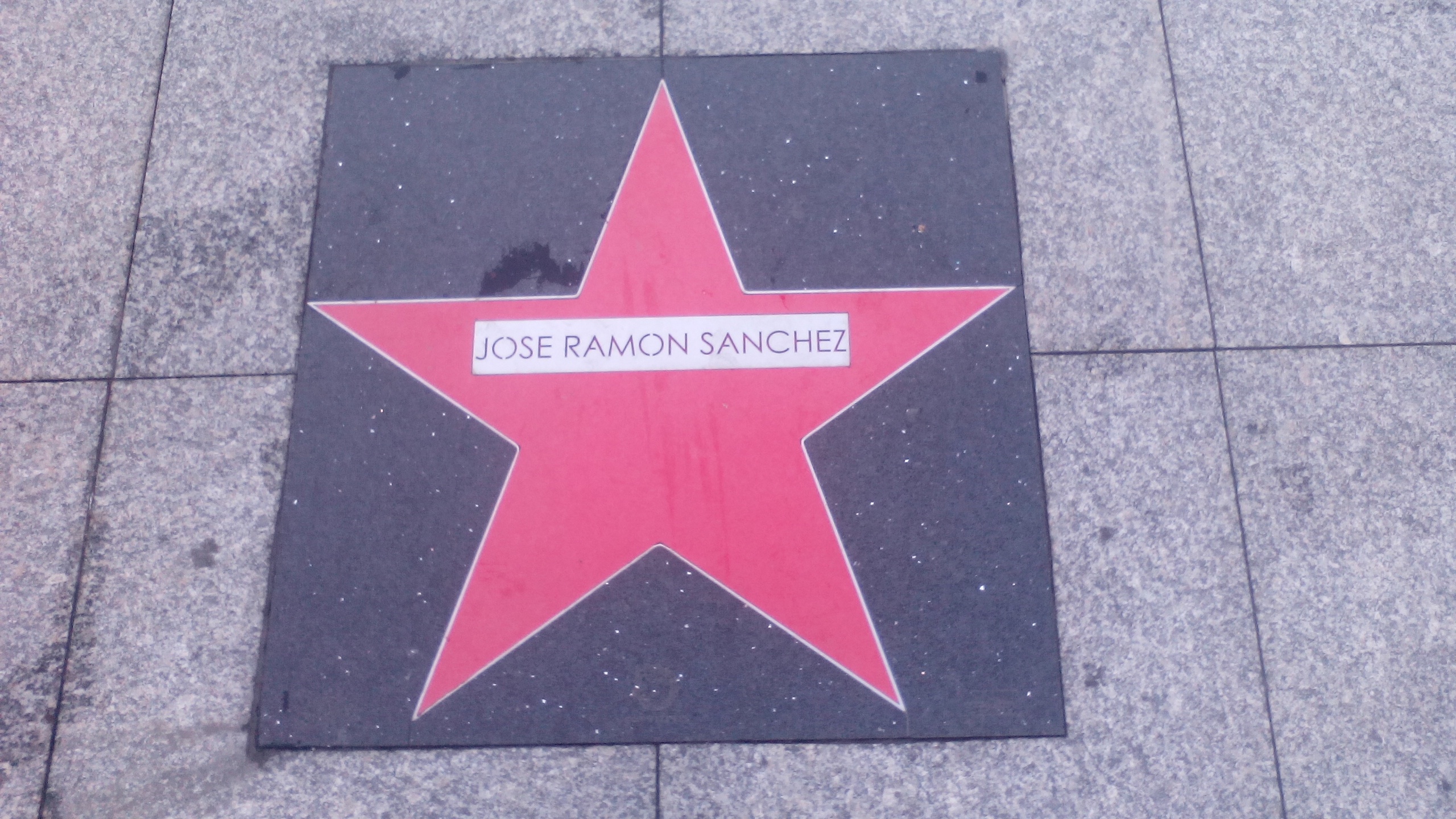 Estrella del dibujante José Ramón Sánchez en el paseo de la fama de Tetuán en Santander (Cantabria, España).